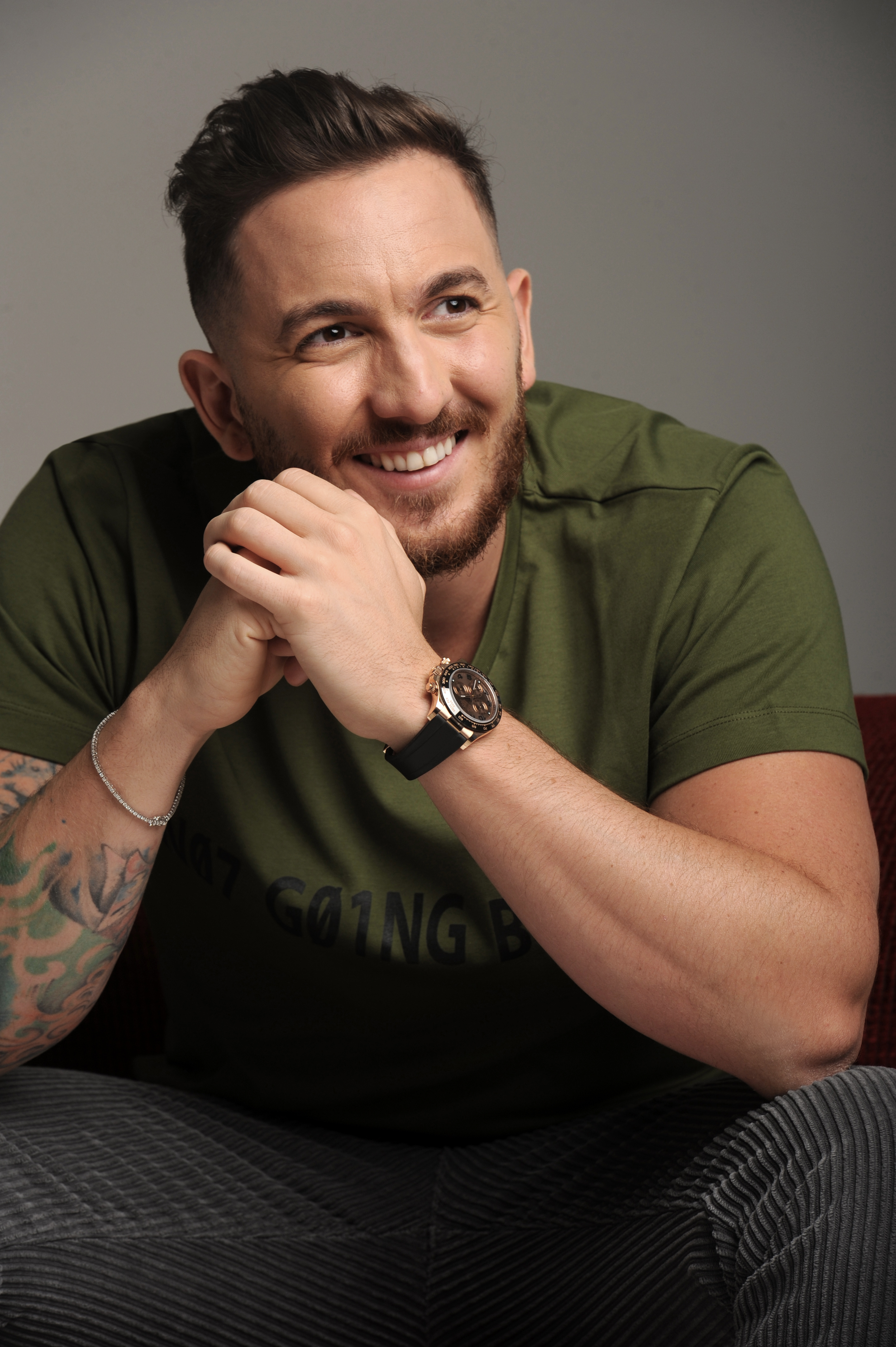 Michele Cosentino